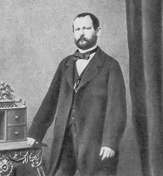 Густав Фаберже (1814-1893), ювелир